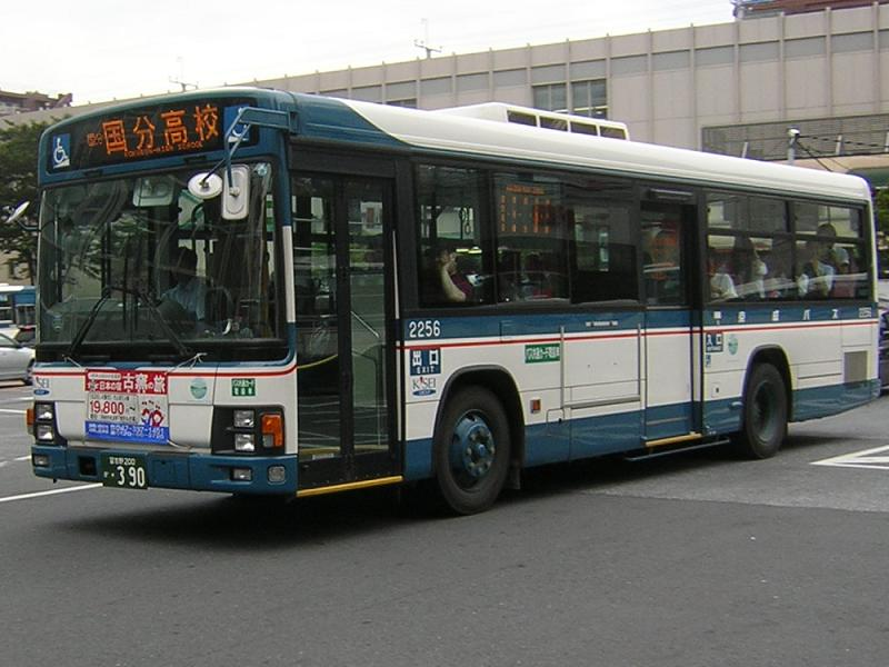 登録番号 習志野200か・390 京成バス市川営業所所属 車番2256 2005年7月20日 市川駅前にて撮影